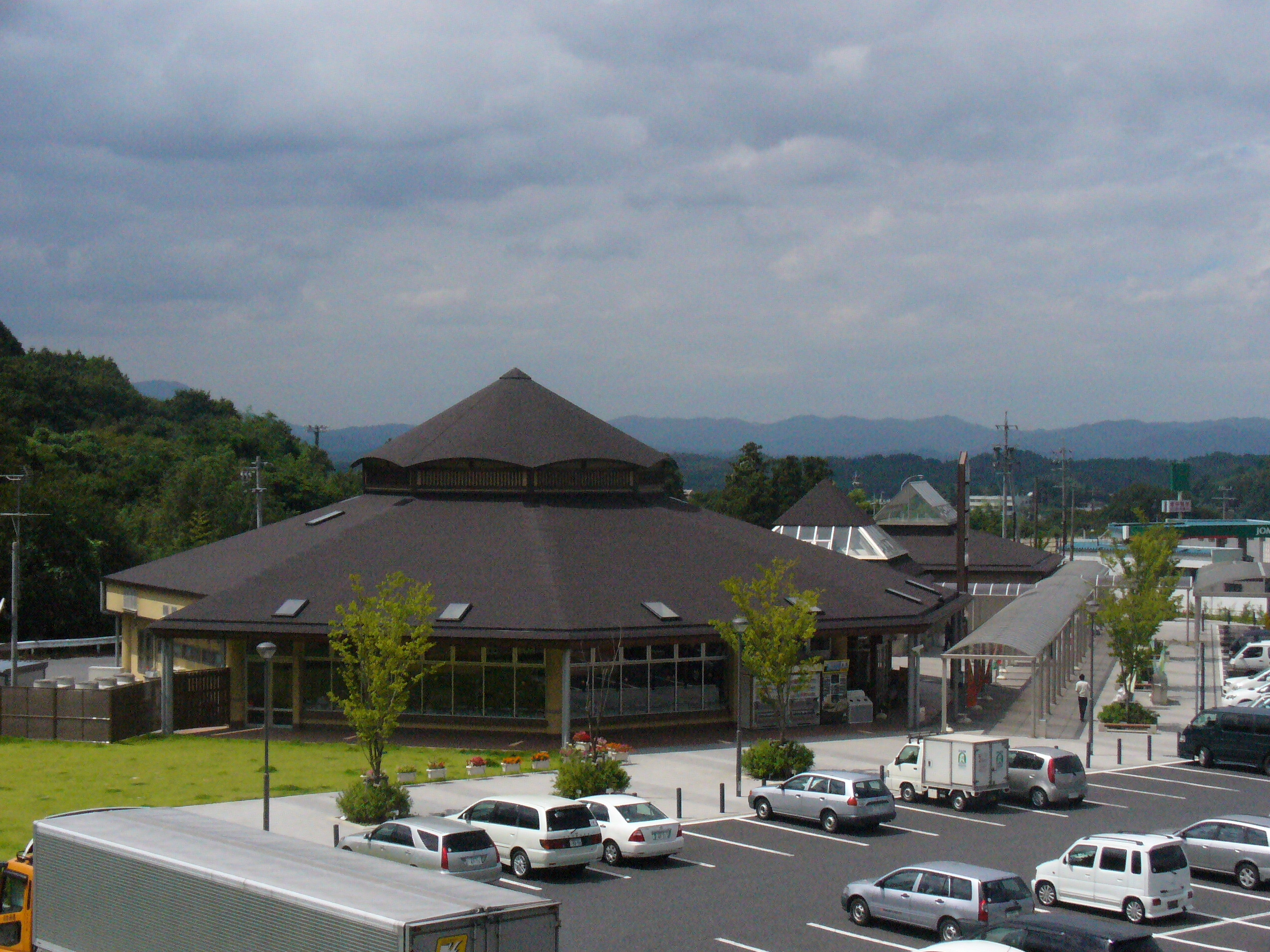 Iga SA(to Osaka)（伊賀サービスエリア）道の駅いが（大阪方面）,Iga,Mie,Japan（三重県伊賀市）で撮影。